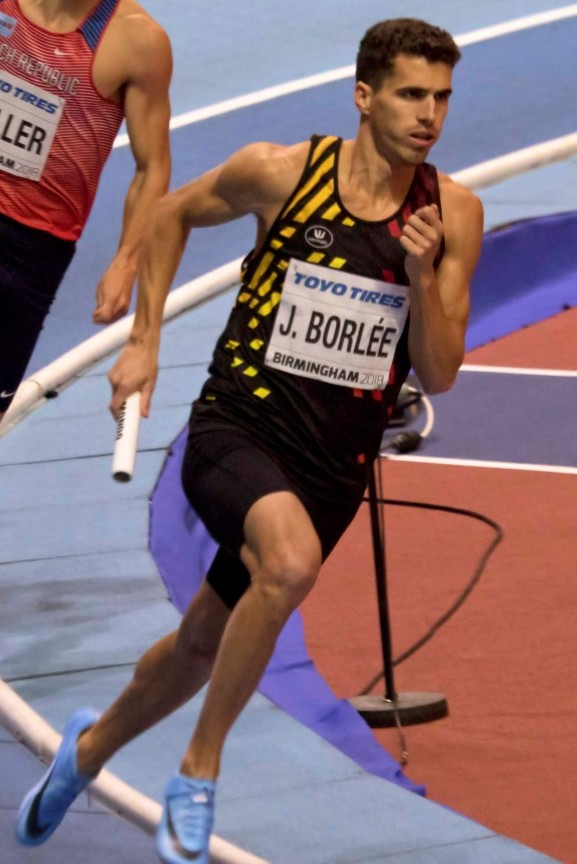 WK3A0198 4x400 reeksen jonathan